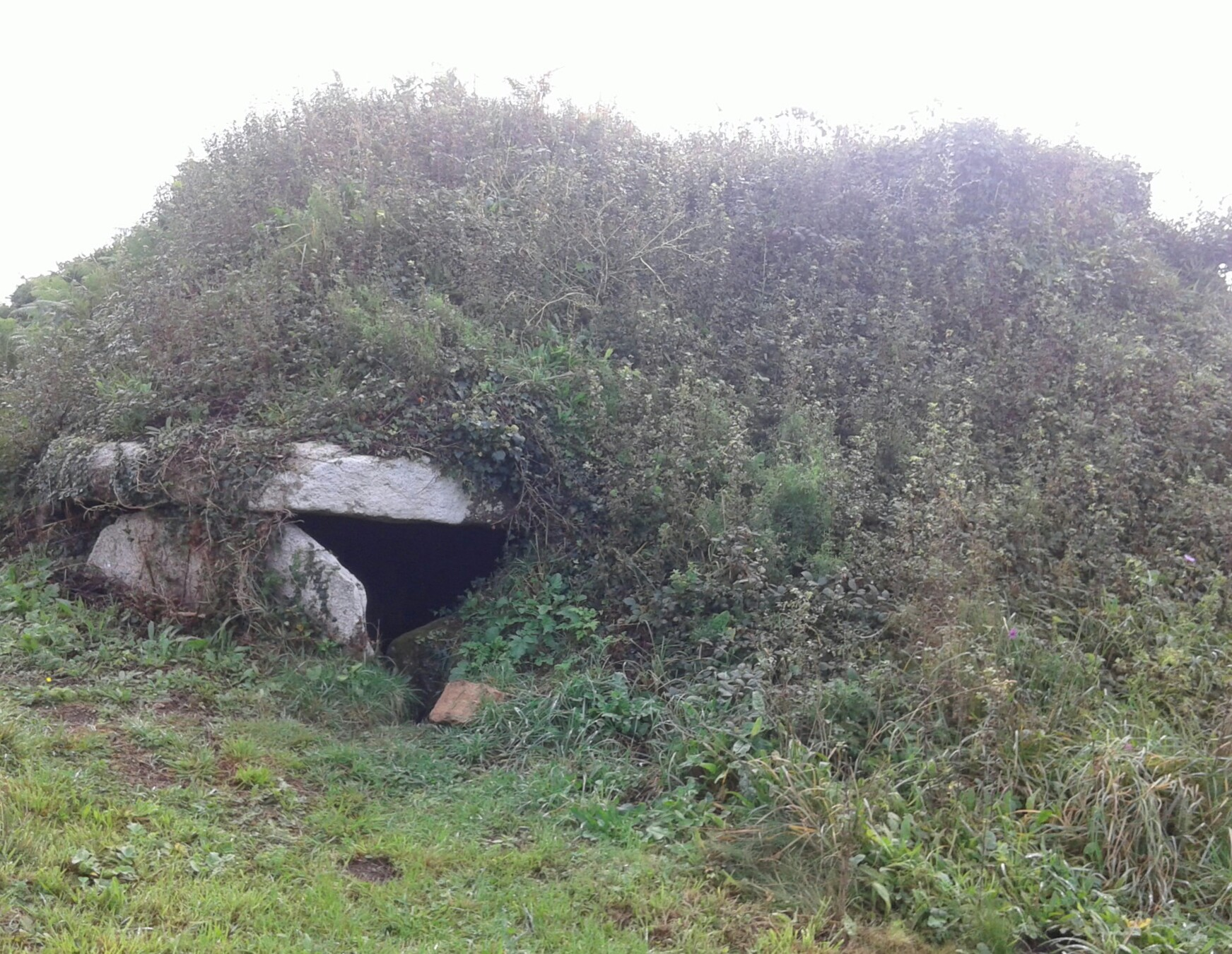 Tumulus de Poulguen à Penmarc'h